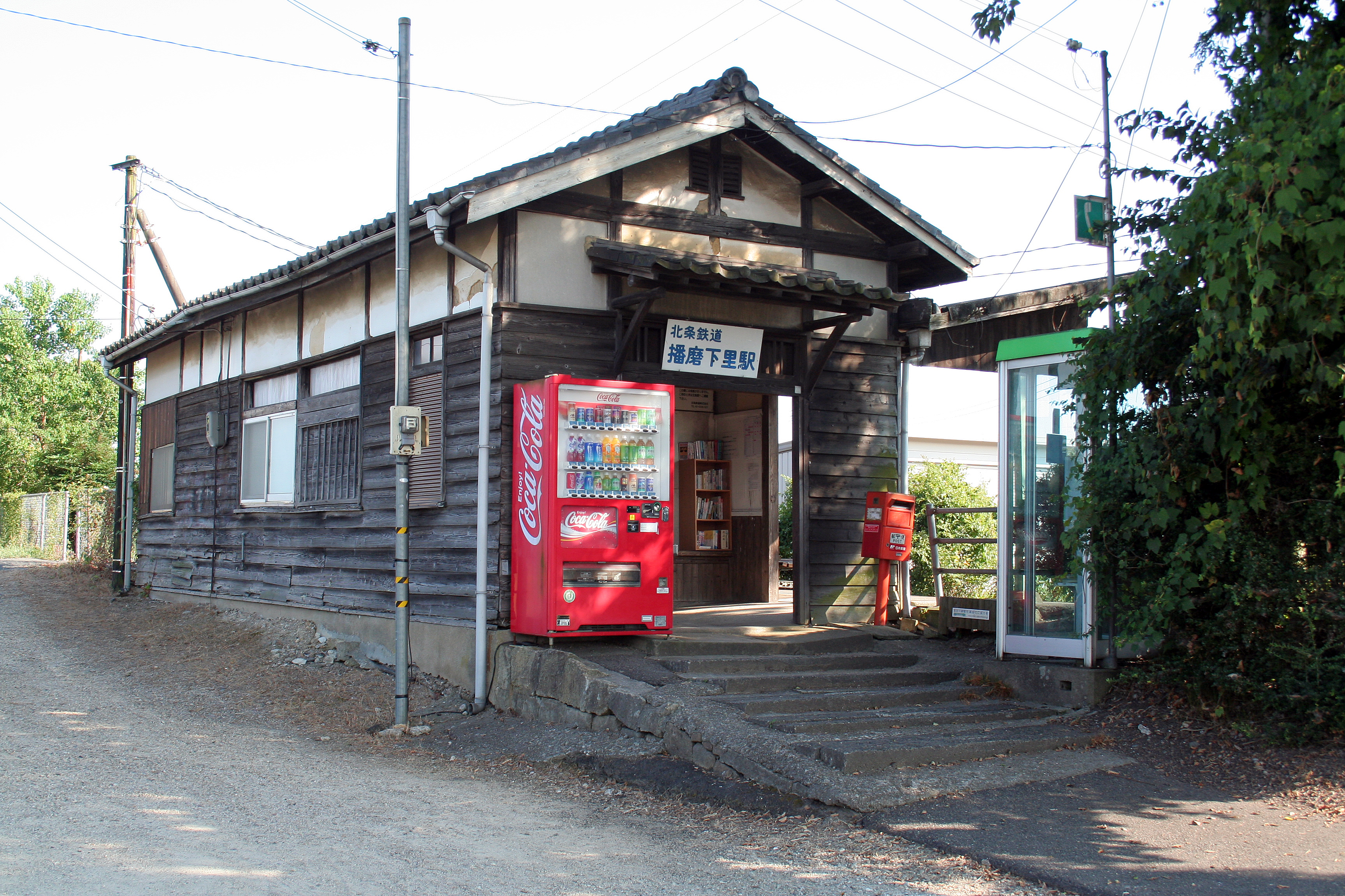 播磨下里駅。日本にある鉄道駅の一つ。 駅舎。